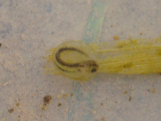 Triturus alpestris ovum, oeuf de triton alpestre, alpine newt egg.